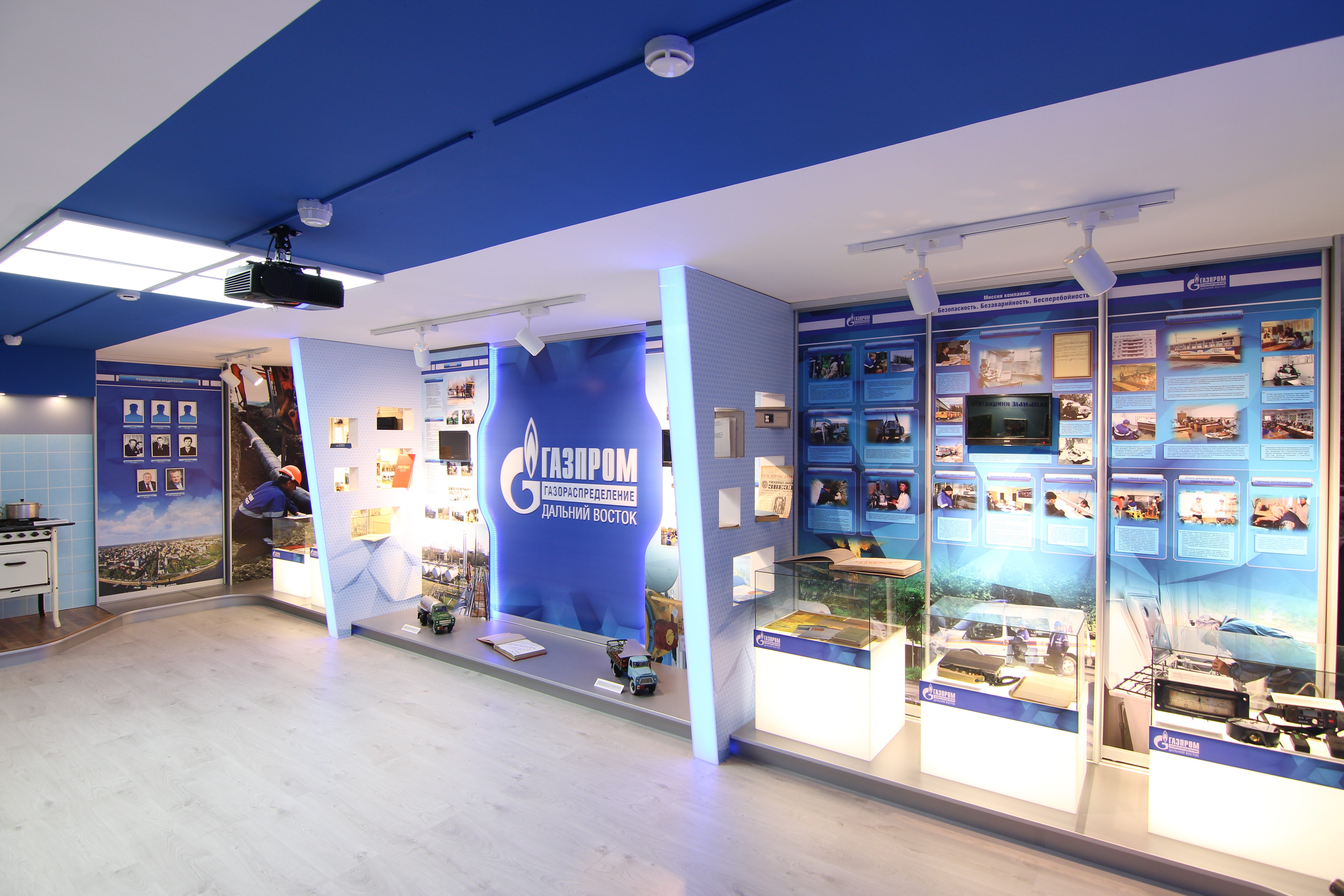 Одна из частей экспозиции музея газификации Дальнего Востока